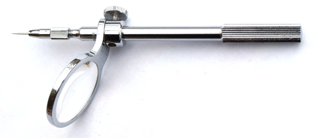 Kopiernadel zum exakten Markieren von Punkten durch einen Stich oder zum Kopieren von Zeichnungspunkten durch Durchstechen